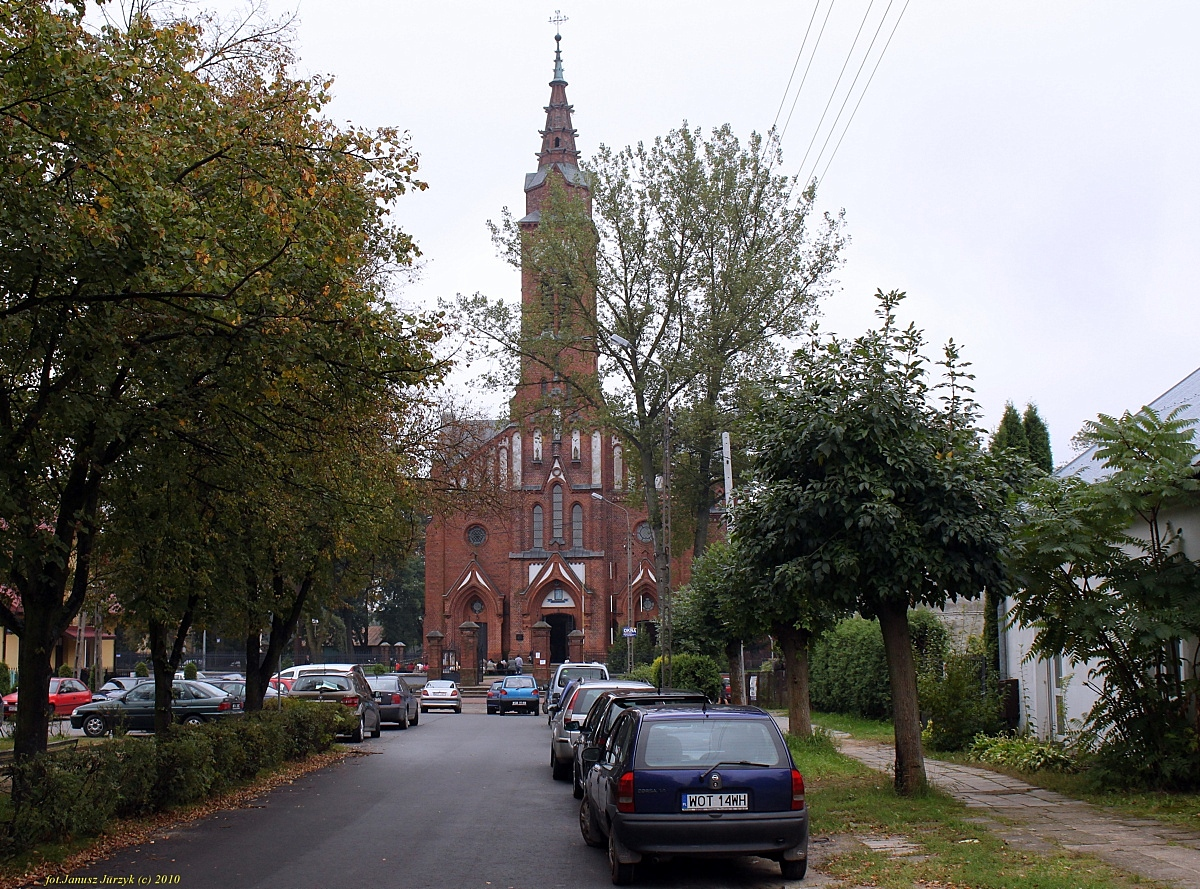 Kościół parafialny p.w. św. Trójcy. 09.1983.